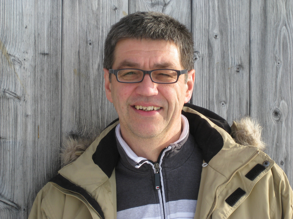 Schriftsteller Stefan König